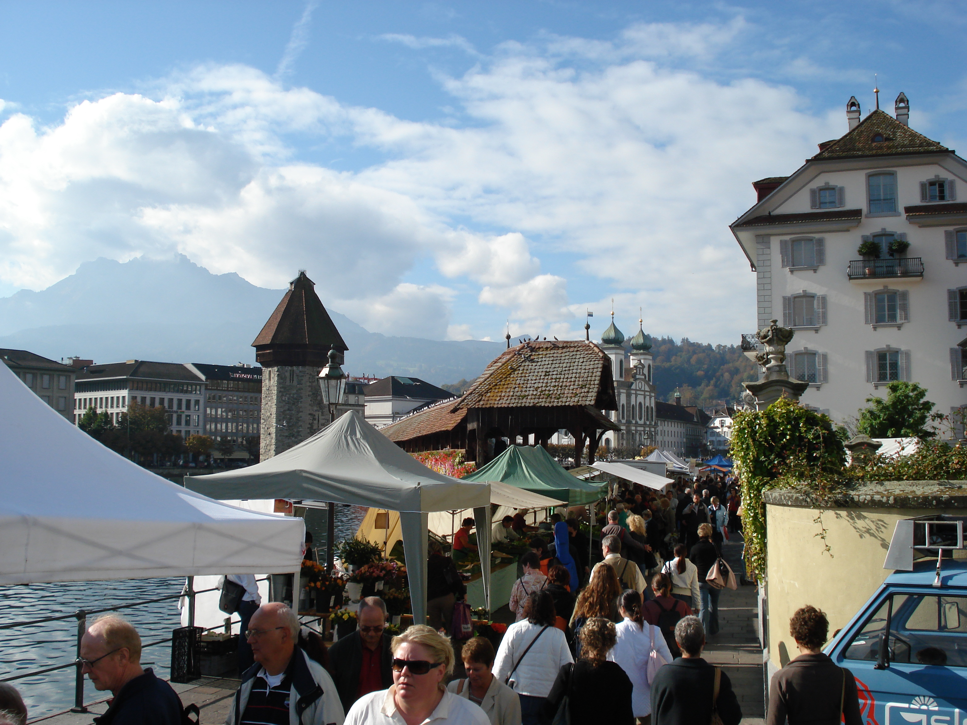 Luzern (Altstadt): Promenade am Nordufer des Flusses Reuss, im Hintergrund der Wasserturm und die Kappellbrücke. Halb verdeckt: Jesuitenkirche.